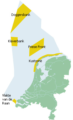 Gebieden in de Noordzee